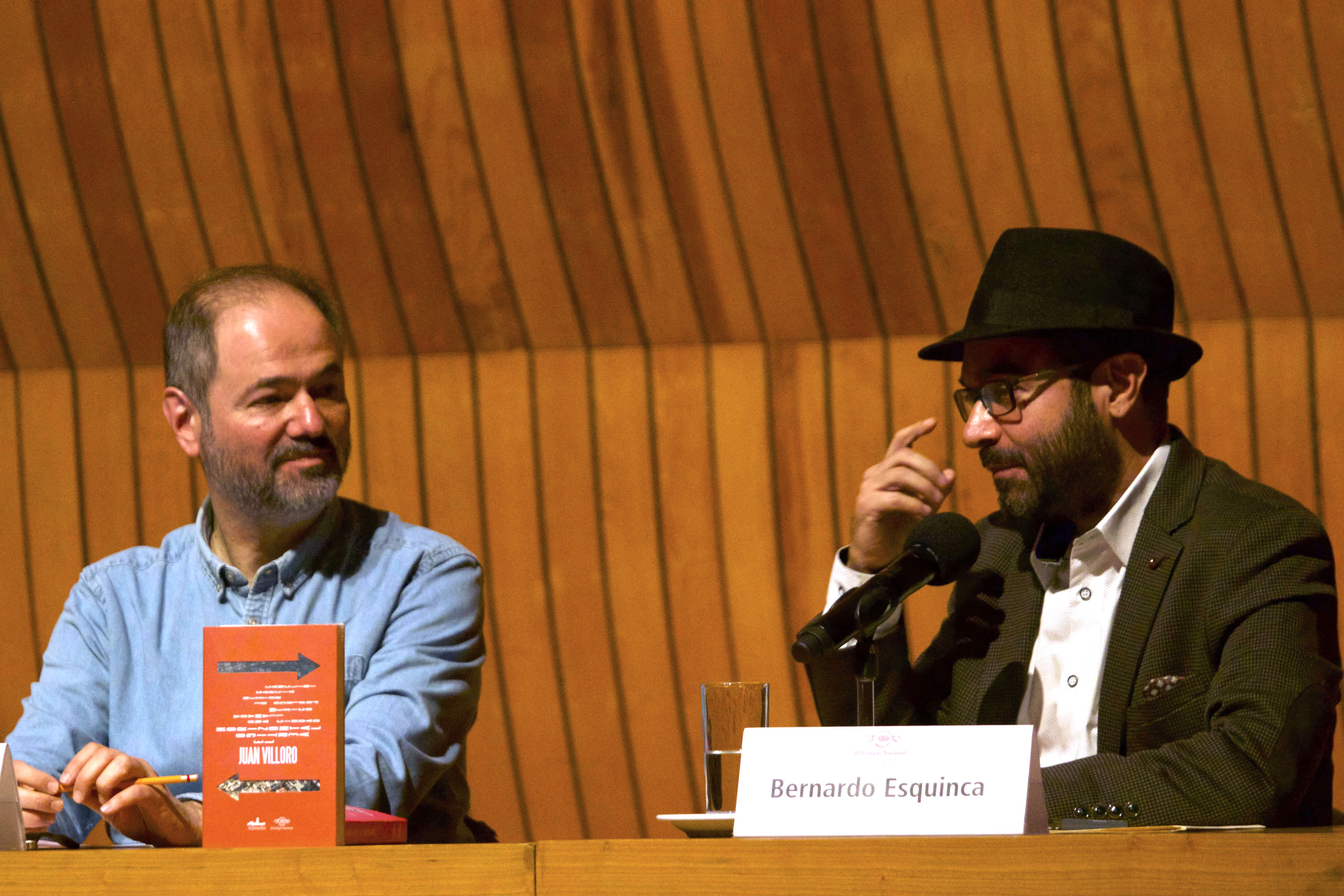 Miércoles 19 de septiembre de 2018. En El Colegio Nacional, Juan Villoro, presentó su más reciente libro, El Vértigo Horizontal, una Ciudad llamada México; un recuento de crónicas de Villoro, escritas entorno a la gran metrópoli y contó con los comentarios de los escritores Eduardo Vázquez Martín, secretario de Cultura de la Ciudad de México; Bernardo Esquinca y Mauricio Montiel Figueiras. Fotografía: Milton Martínez / Secretaría de Cultura CDMX.